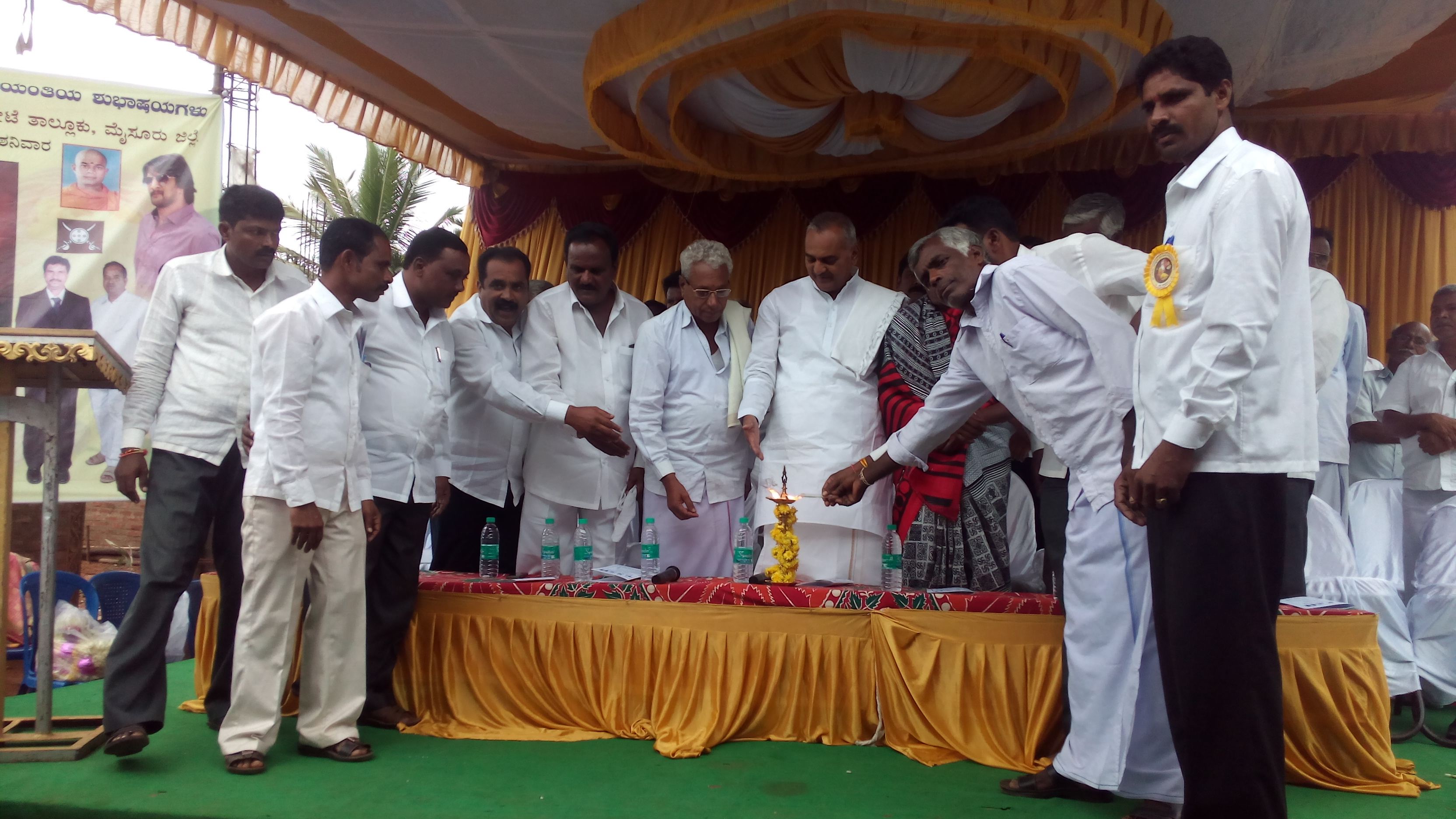 ಕನ್ನಡ: ಚಿಕ್ಕಣ್ಣ ಹಾಗೂ ಮತ್ತಿತರರು